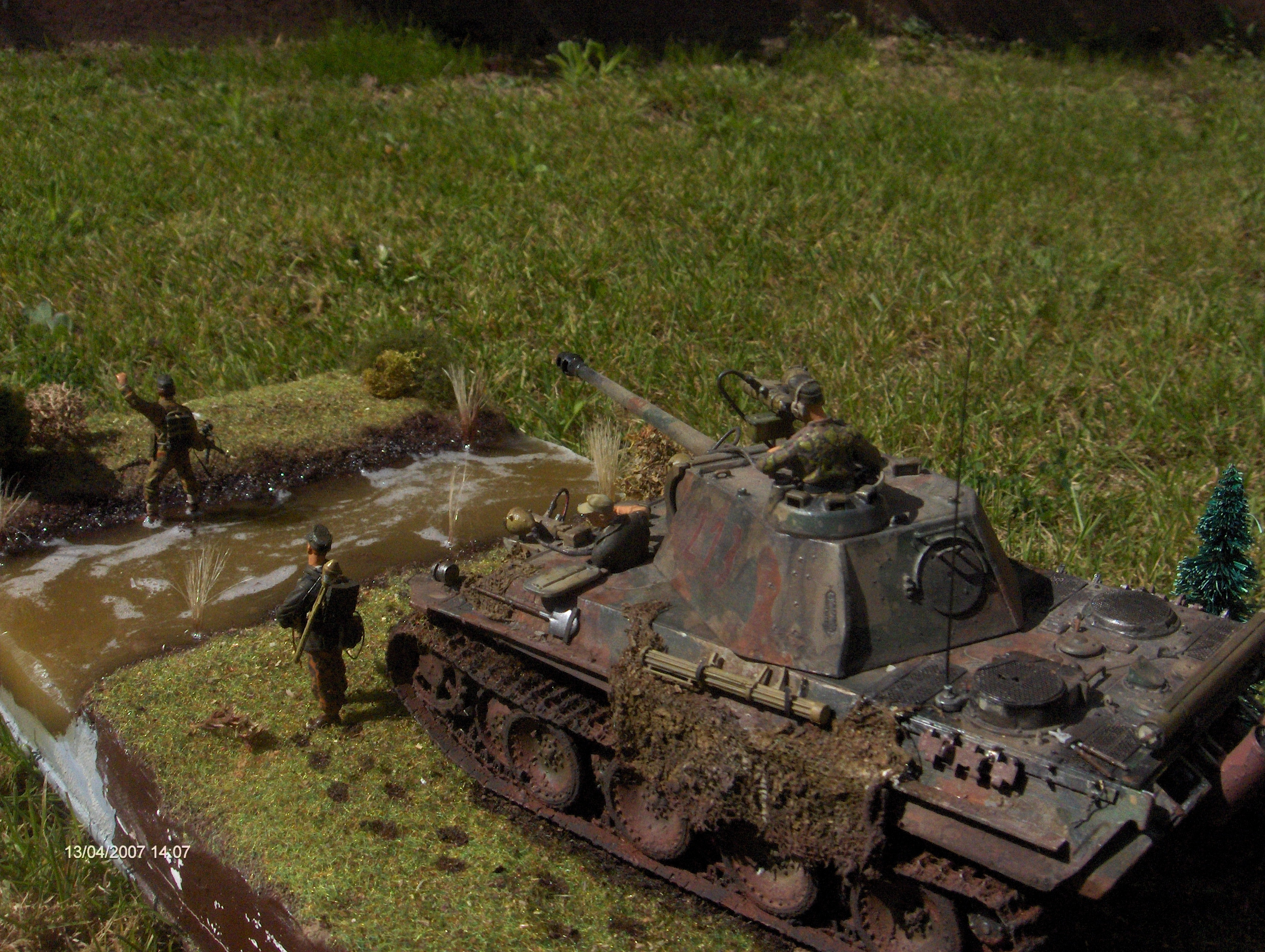 Panthermodell für den "Washing" Artikel